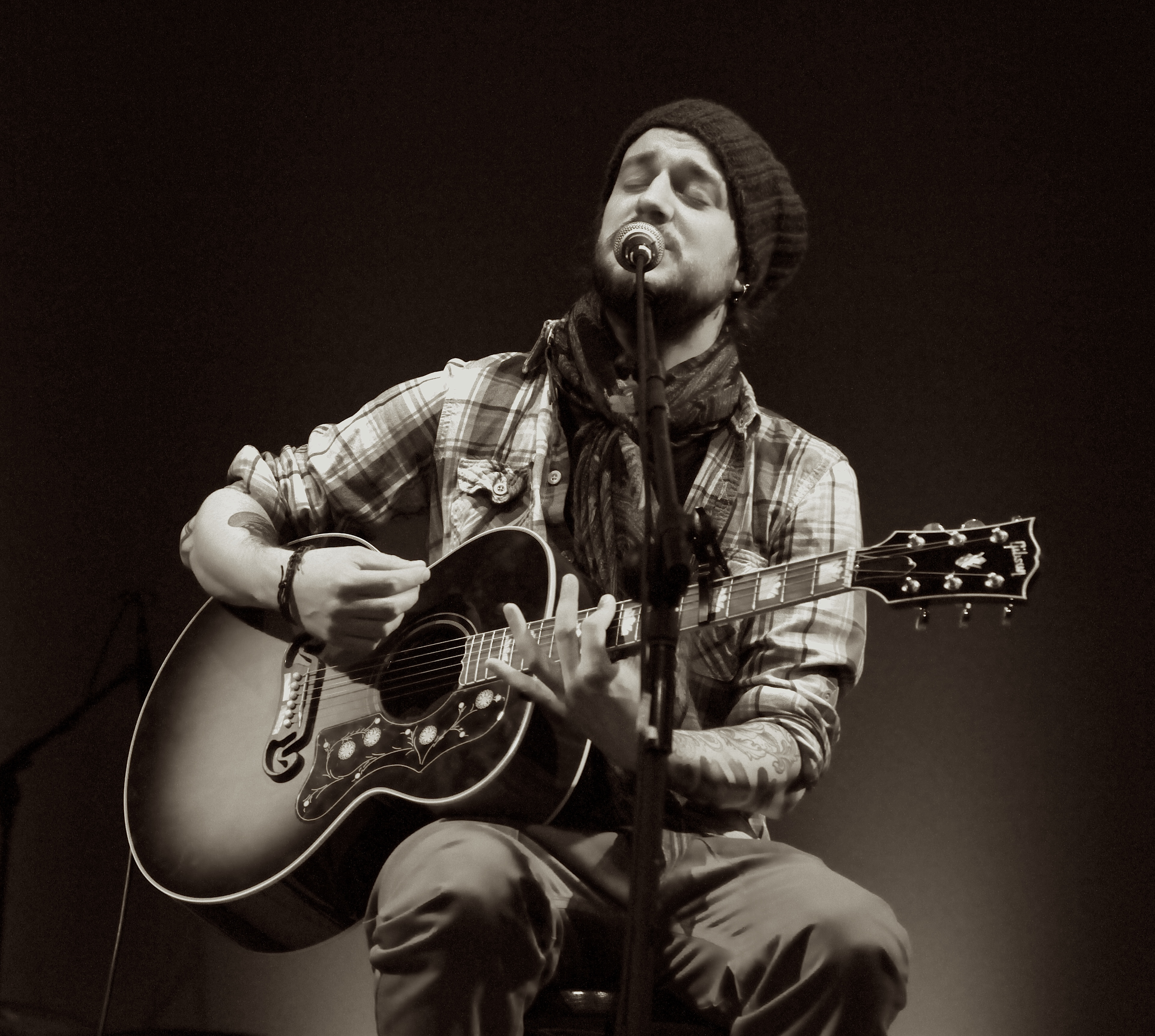 Willer live bei einem Konzert